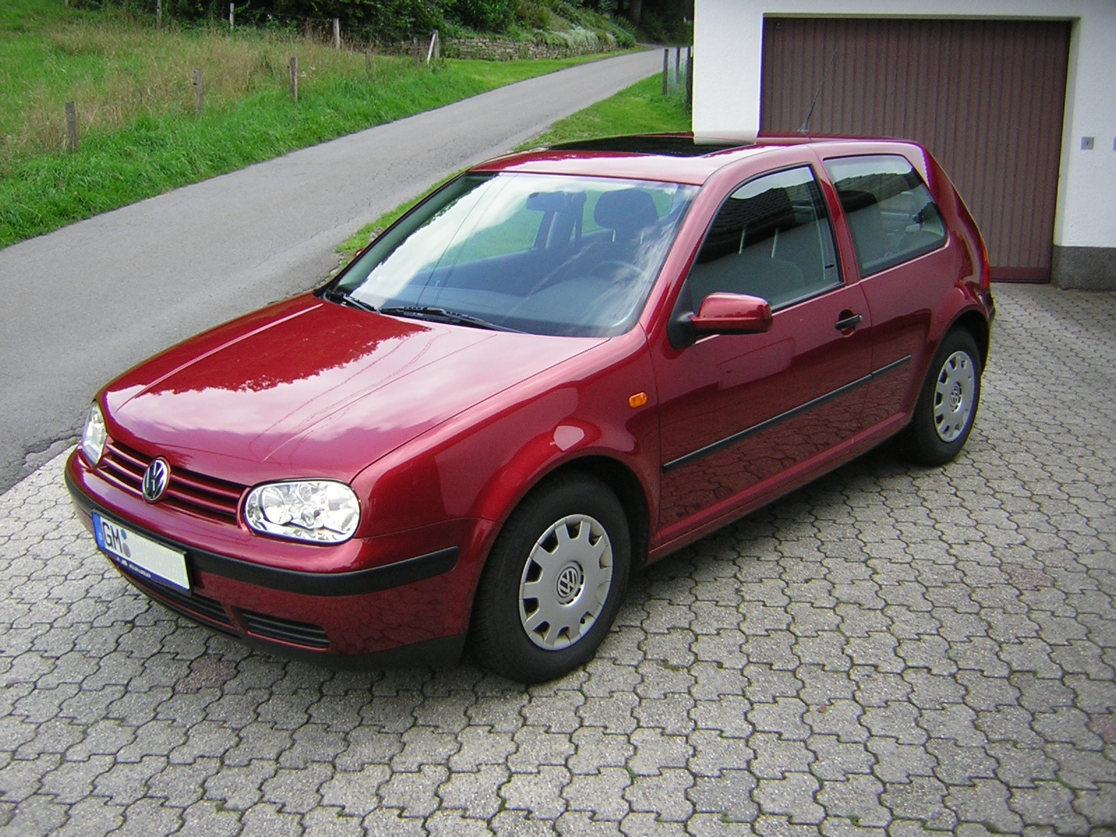 Beschreibung: VW Golf IV Fotograf: Trexer, User:Trexer Aufgenommen: 2006 mit Nikon Coolpix 2200